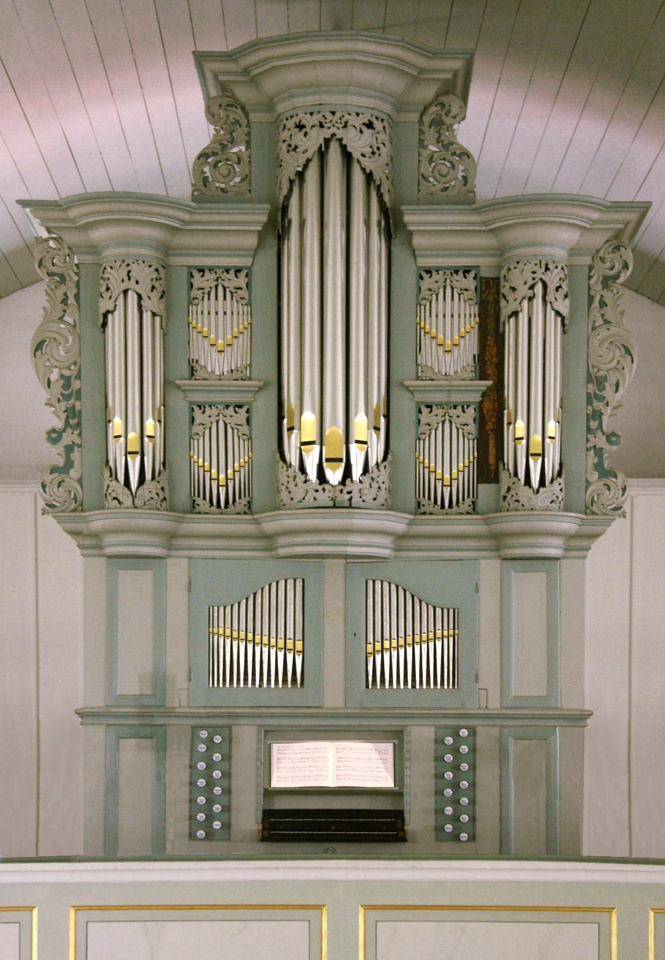 Arp-Schnitger-Orgel in Grasberg, Landkreis Osterholz, Niedersachsen